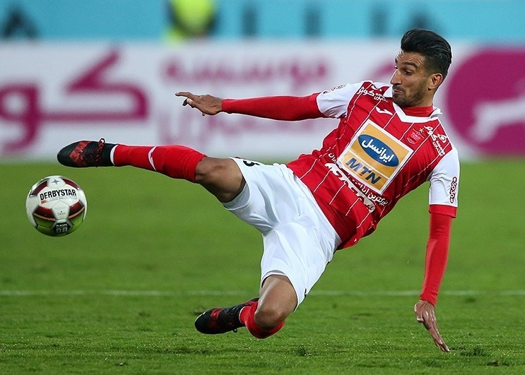 حسین ماهینی در مسابقه پرسپولیس و گسترش فولاد (هفته بیستم لیگ برتر فوتبال ایران) در ورزشگاه آزادی تهران